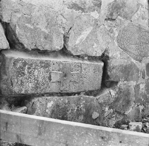 Kisthäll, 1200-talet, under framtagning ur sakristians norra vägg. Kategori: (09) Gravar Kisthäll, 1200-talet, under framtagning ur sakristians norra vägg.